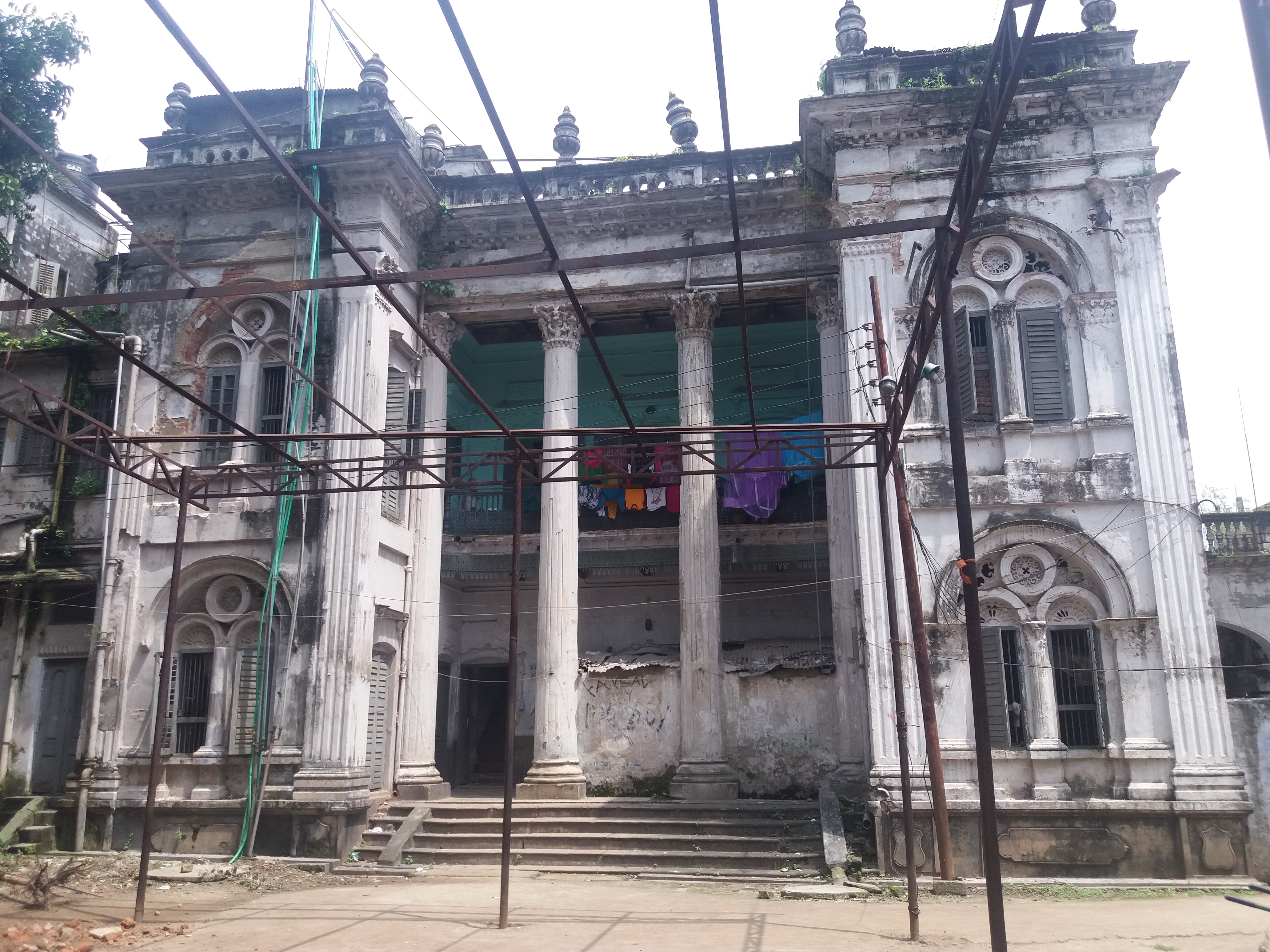 সূত্রাপুর জমিদার বাড়ী